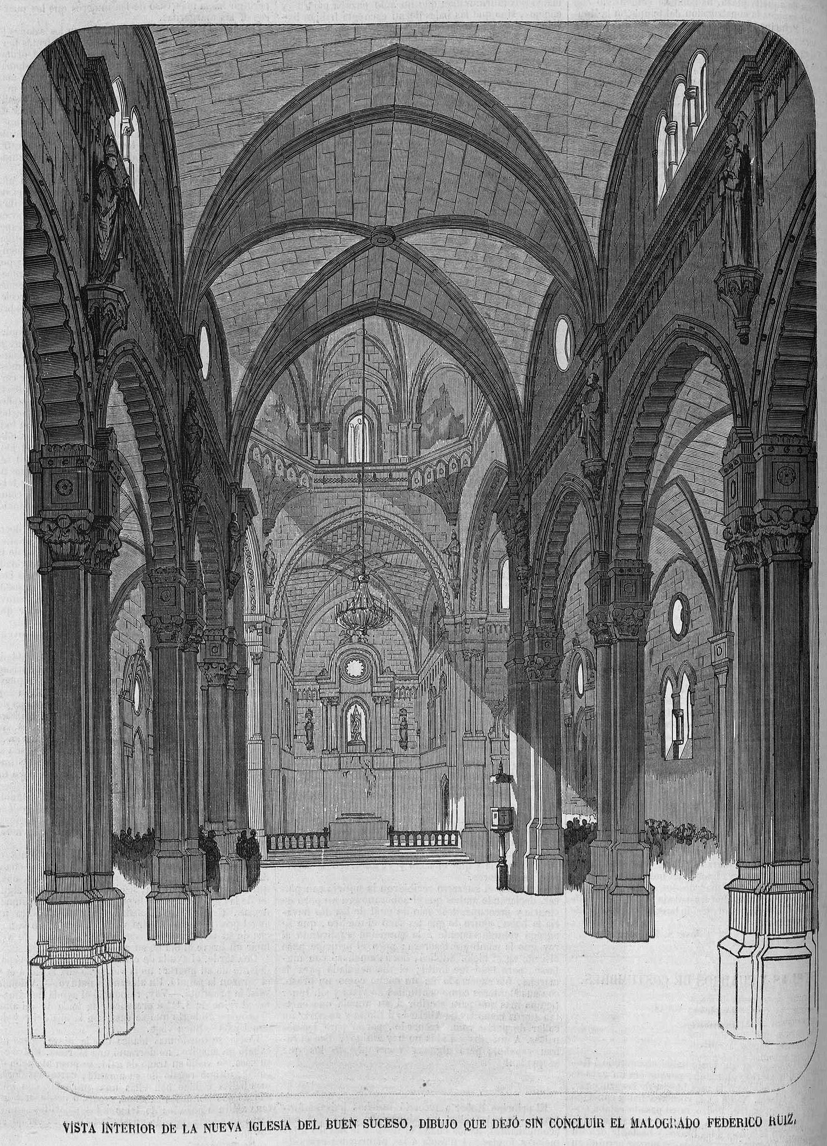 Vista interior de la nueva iglesia del Buen Suceso, dibujo que dejó sin concluir el malogrado Federico Ruiz, en la revista española El Museo Universal.